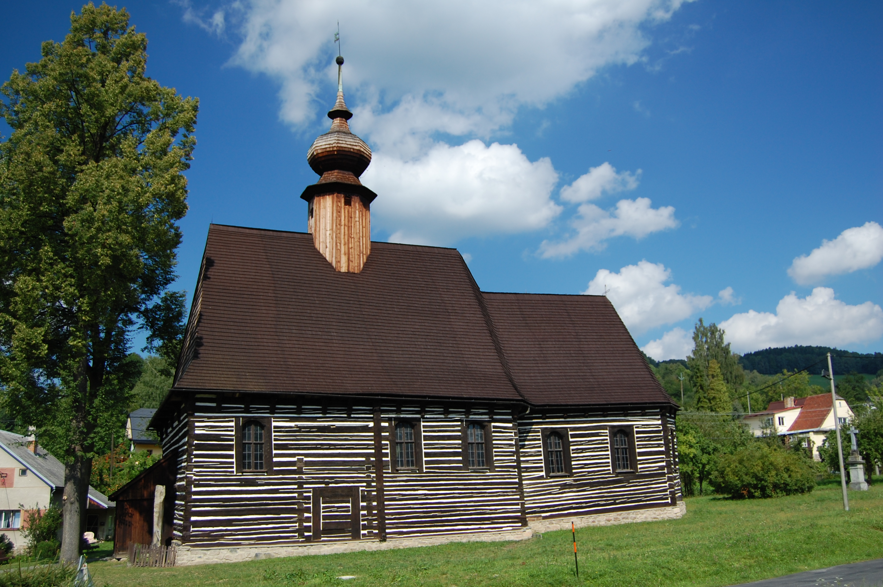 Kostel svatého Michala v Maršíkově - boční pohled, Velké Losiny, okres Šumperk